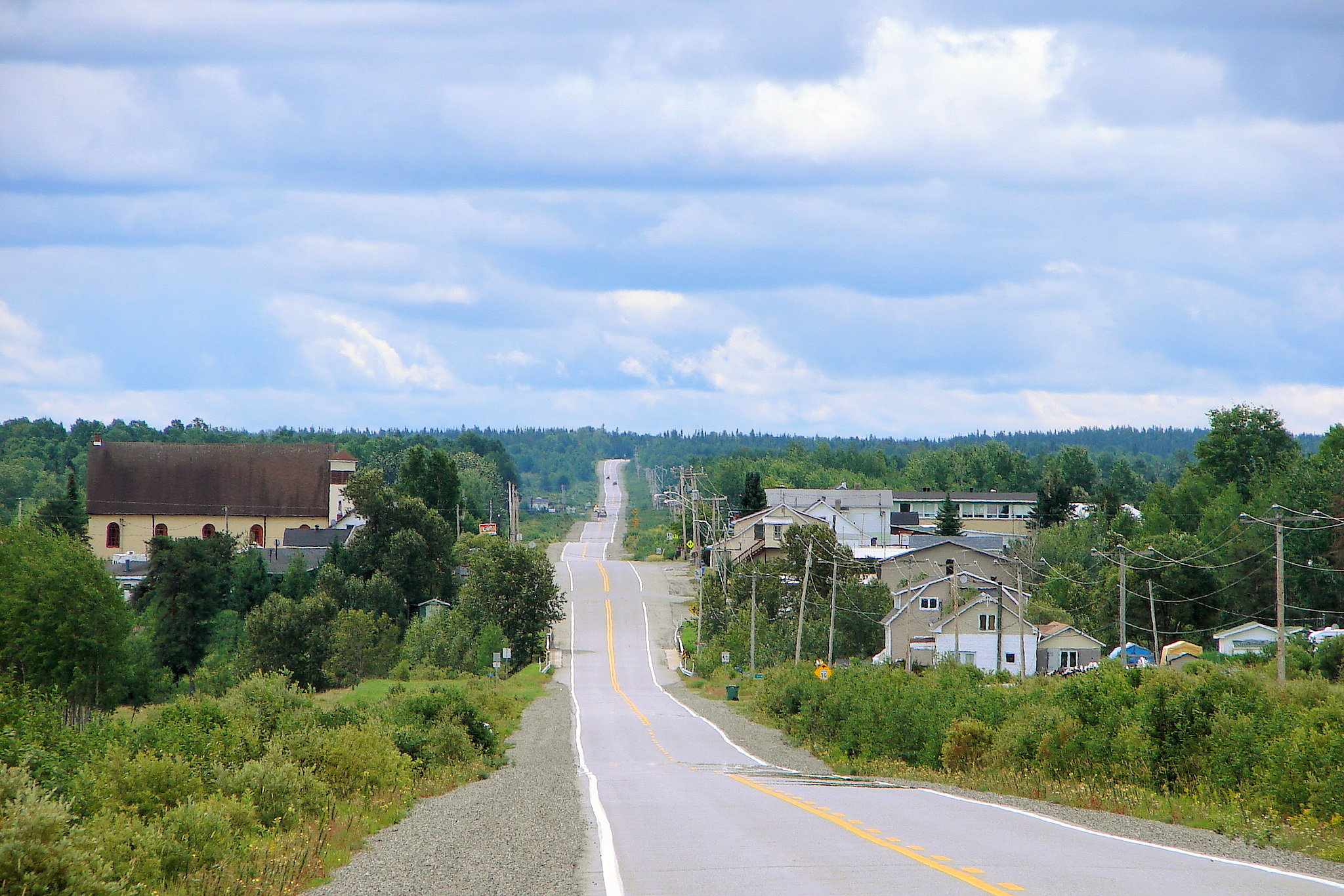 La Morandière, Quebec, Canada